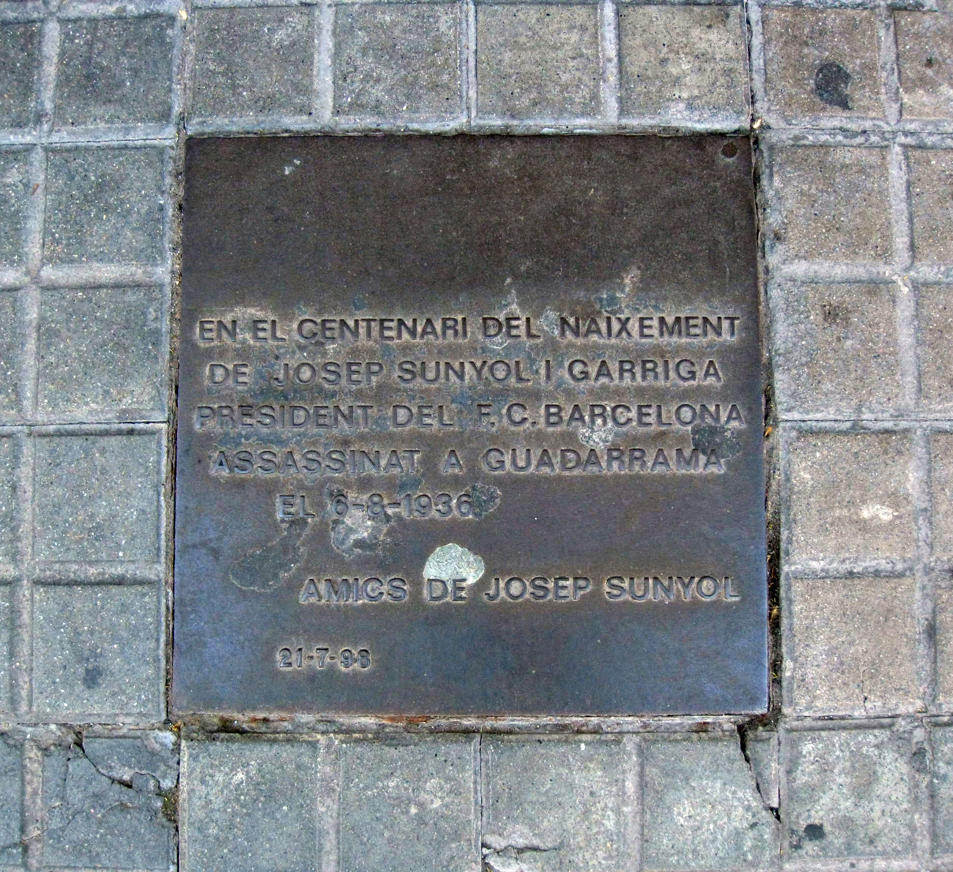 Josep Sunyol. La Rambla, 133 (Barcelona)